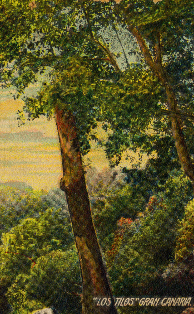 Fragmento de una postal antigua coloreada en la que se aprecian Los Tilos de Moya (Gran Canaria)